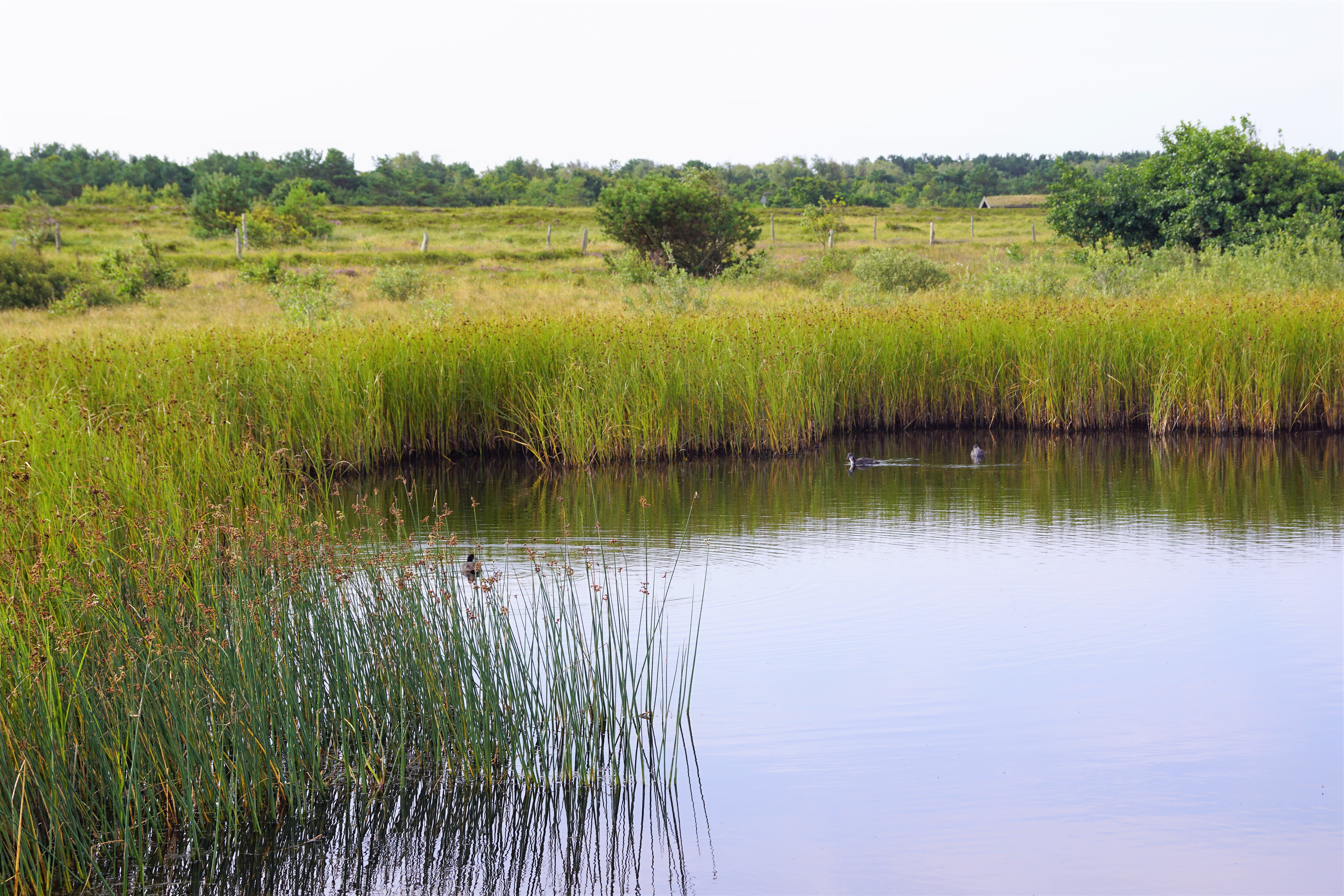 Kær på Læsøs vestkyst